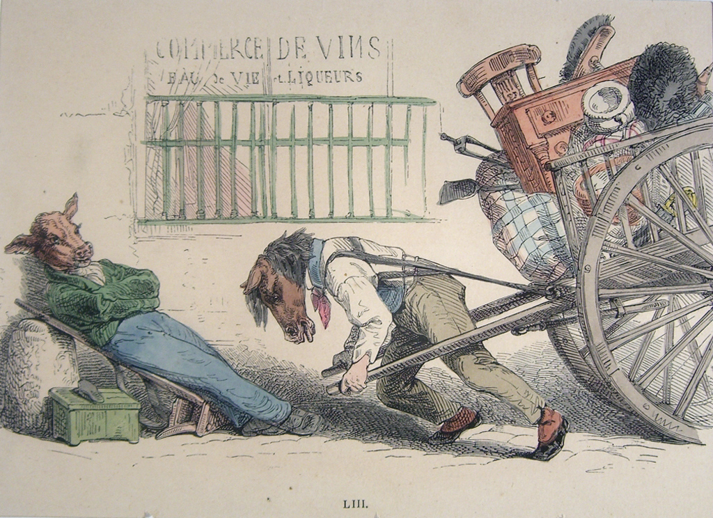 Tiere als Menschen verkleidet. Lithographie von Grandville, 19. Jh.